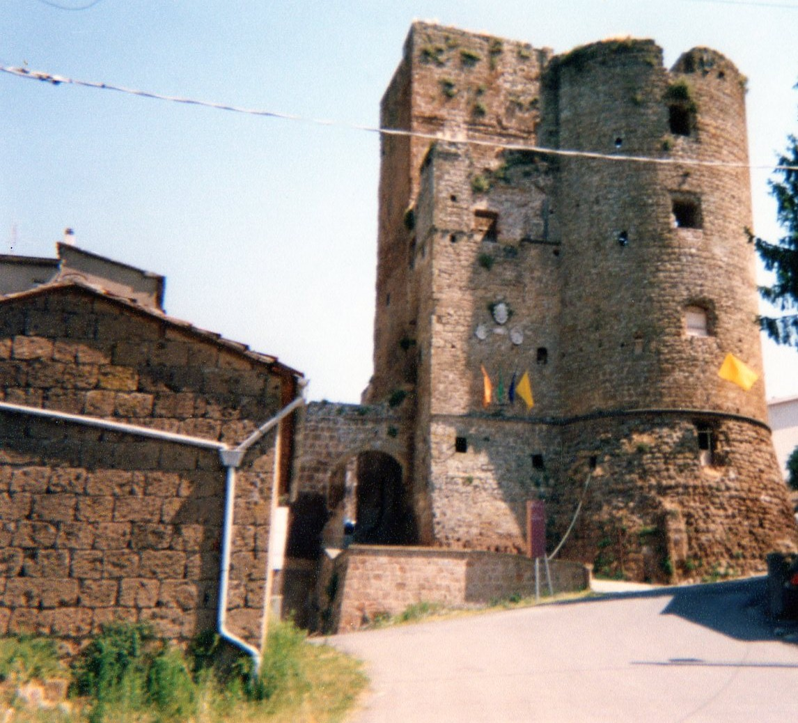 la Rocca di Castell'Ottieri (GR)